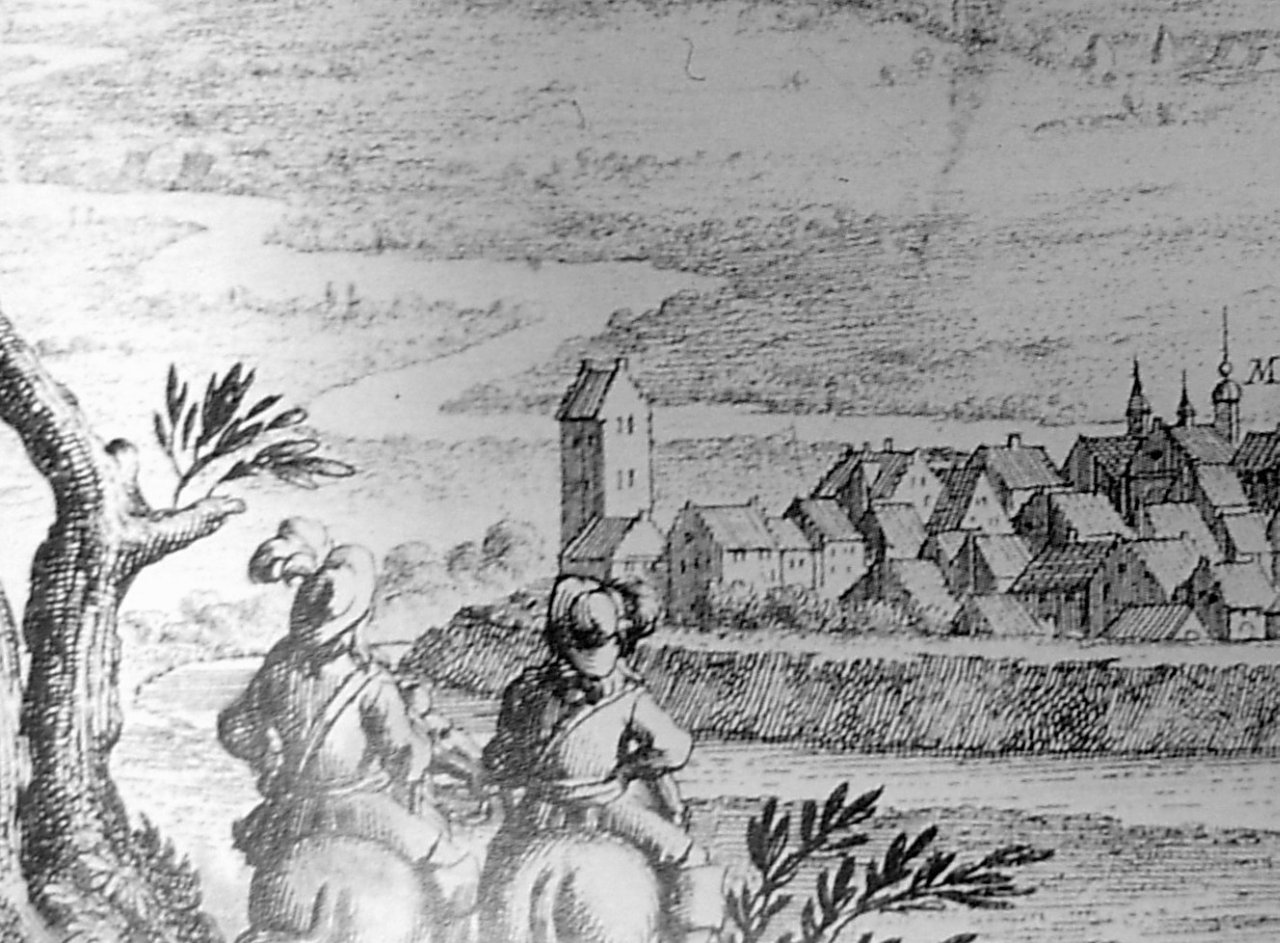 Fragment sztychu Erika Dahlberga z lipca 1657 r. przedstawiający miasto Bydgoszcz wraz ze zniszczonym zamkiem